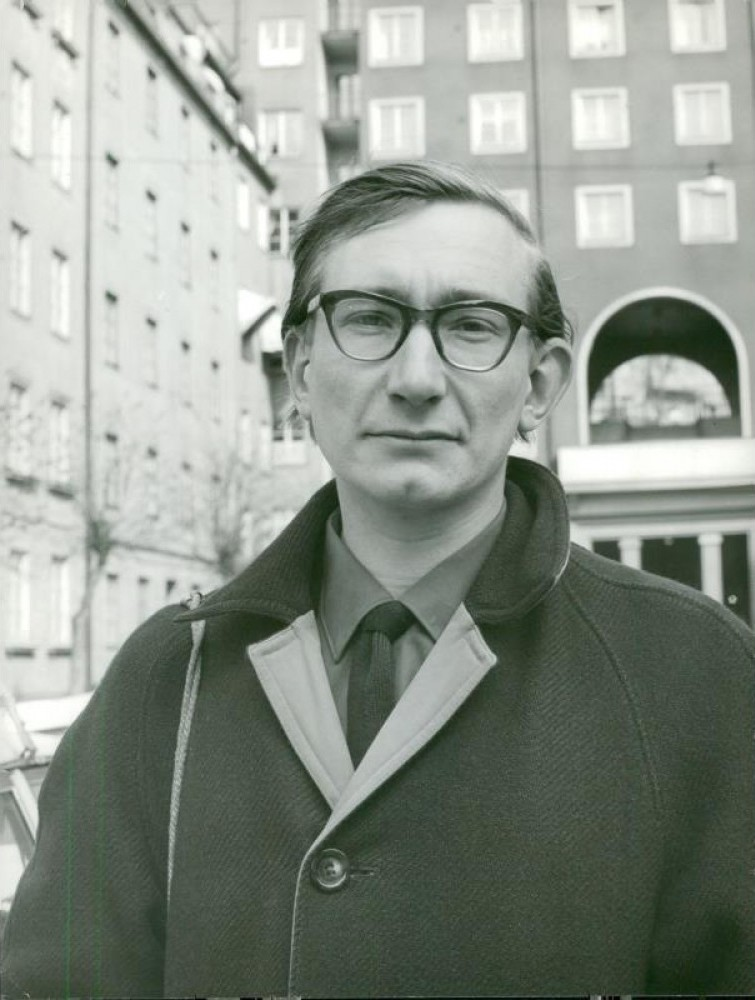 Författaren och journalisten Staffan Beckman. Införd i Svenska Dagbladet 1966-12-19 sid 5 (